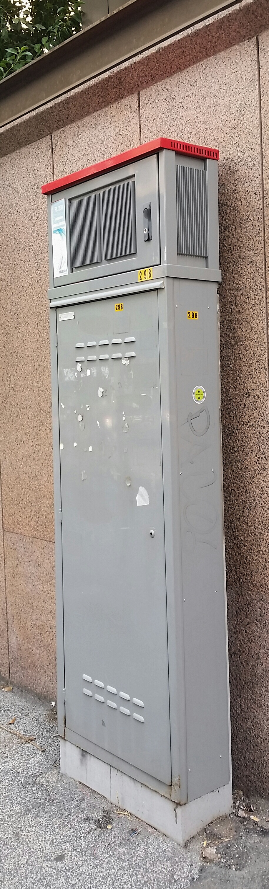 Armadio di derivazione delle connessioni telefoniche in rame, con "zainetto" contenente un DSLAM VDSL2